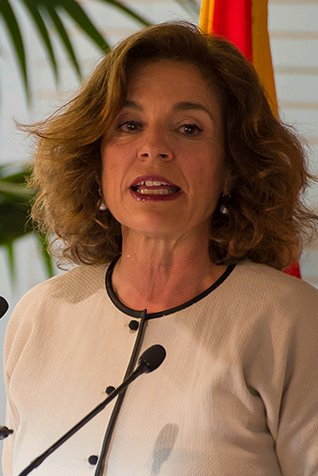 Ana Botella en un acto de homenaje a Fraga